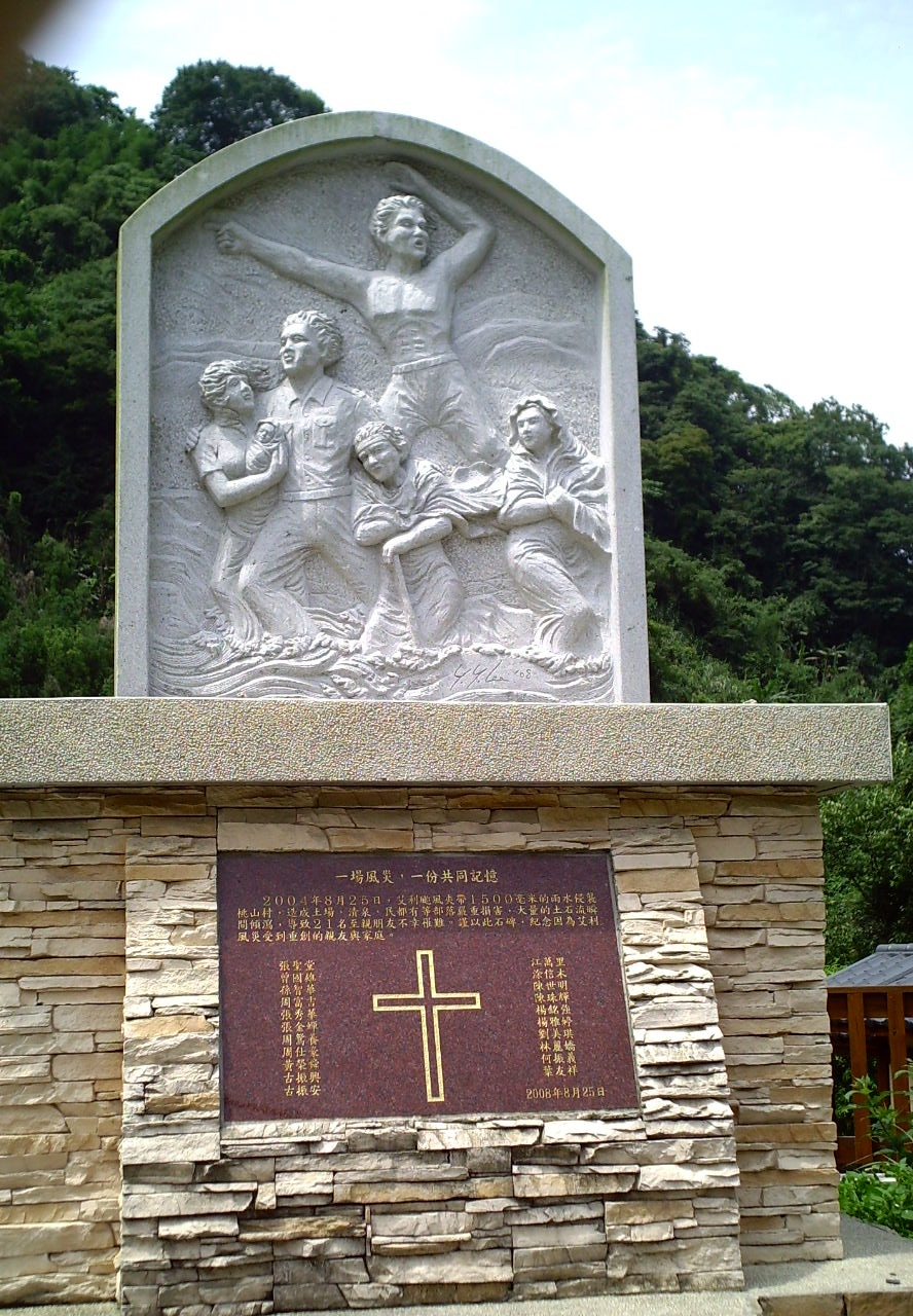 2004年艾利颱風罹難紀念碑，位於臺灣新竹縣五峰鄉